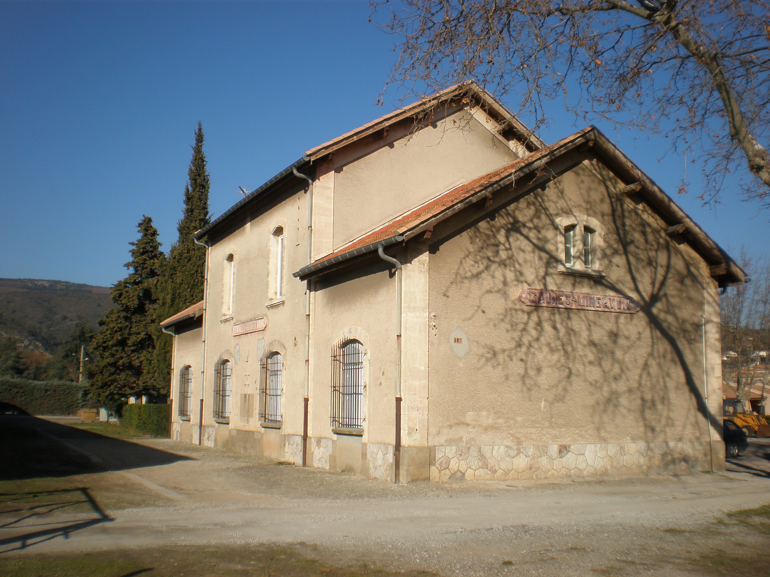 Gare désaffectée de Caunes-Minervois